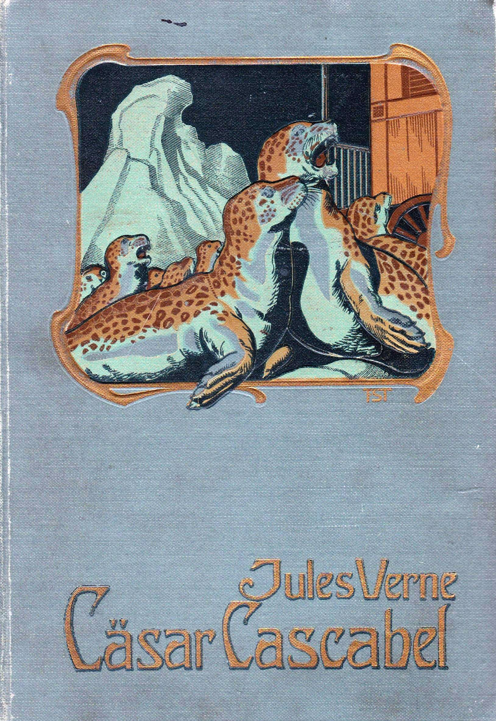 Jules Verne: Cesar Cascabel um 1900, Einbanddeckel